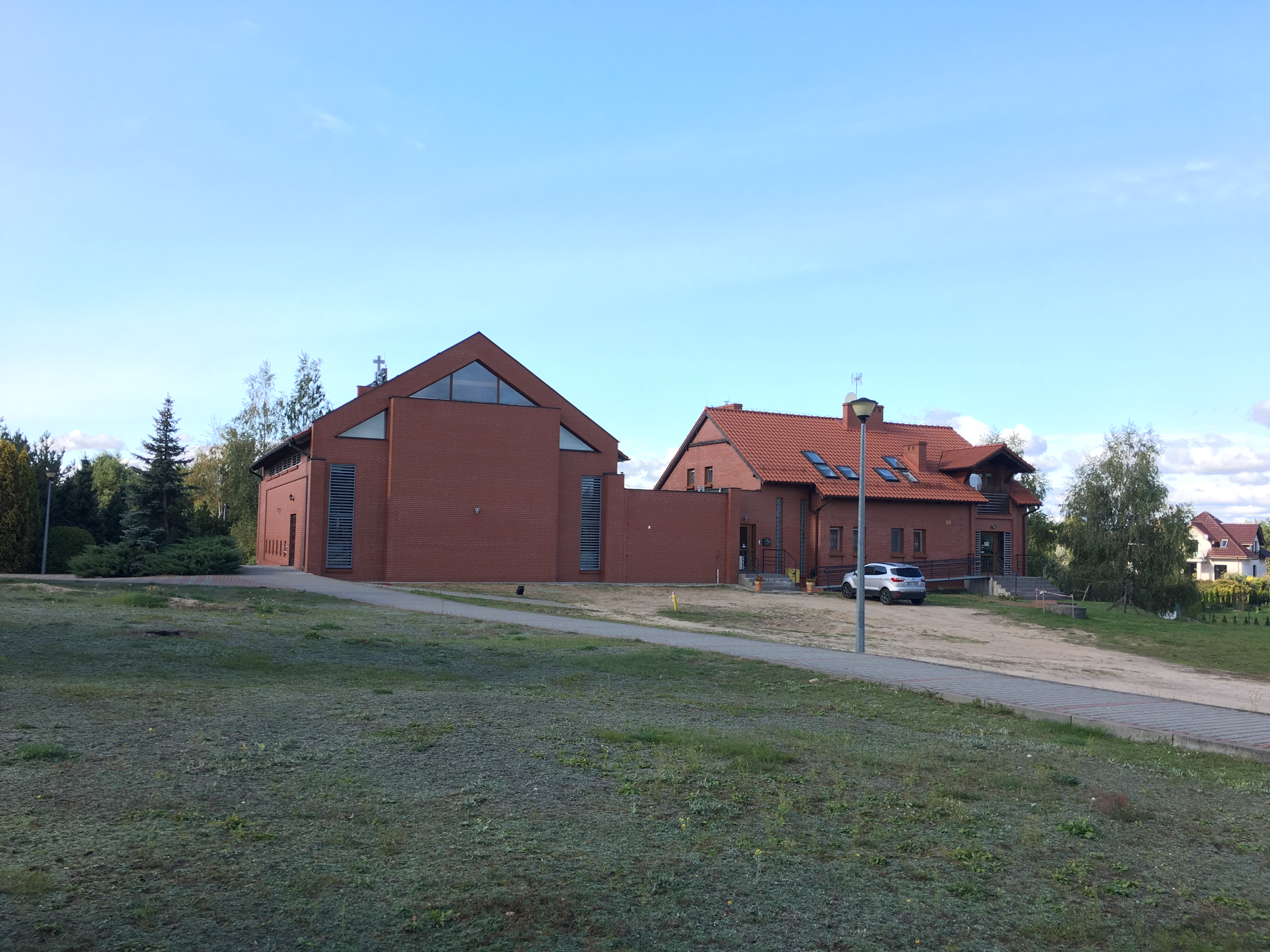 Kościół Jezusa Chrystusa Króla Wszechświata w Starogardzie Gdańskim-Przylesiu, widok od wschodu na prezbiterium i plebanię.